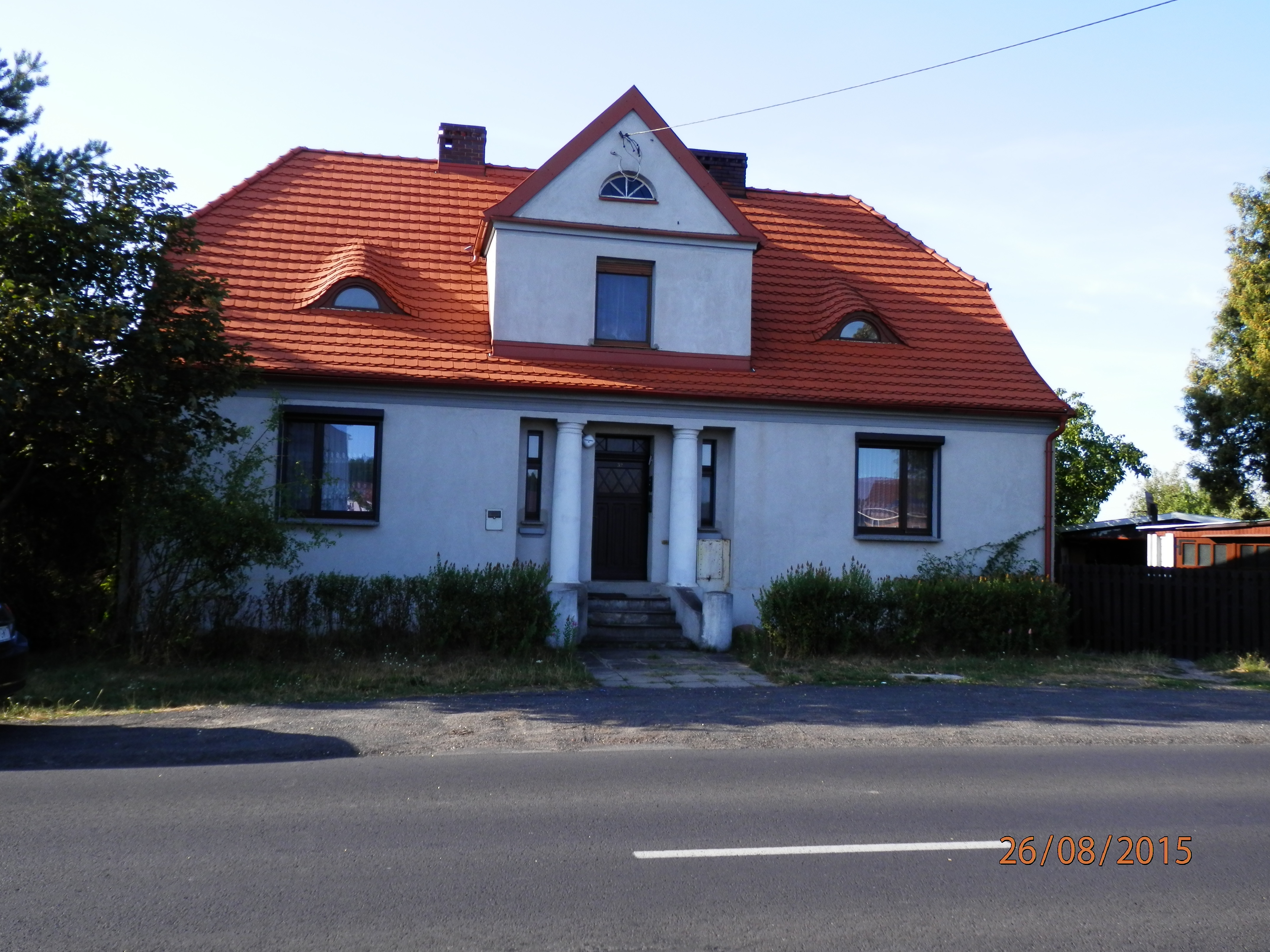 Stan obecny, brak większych przebudowań.